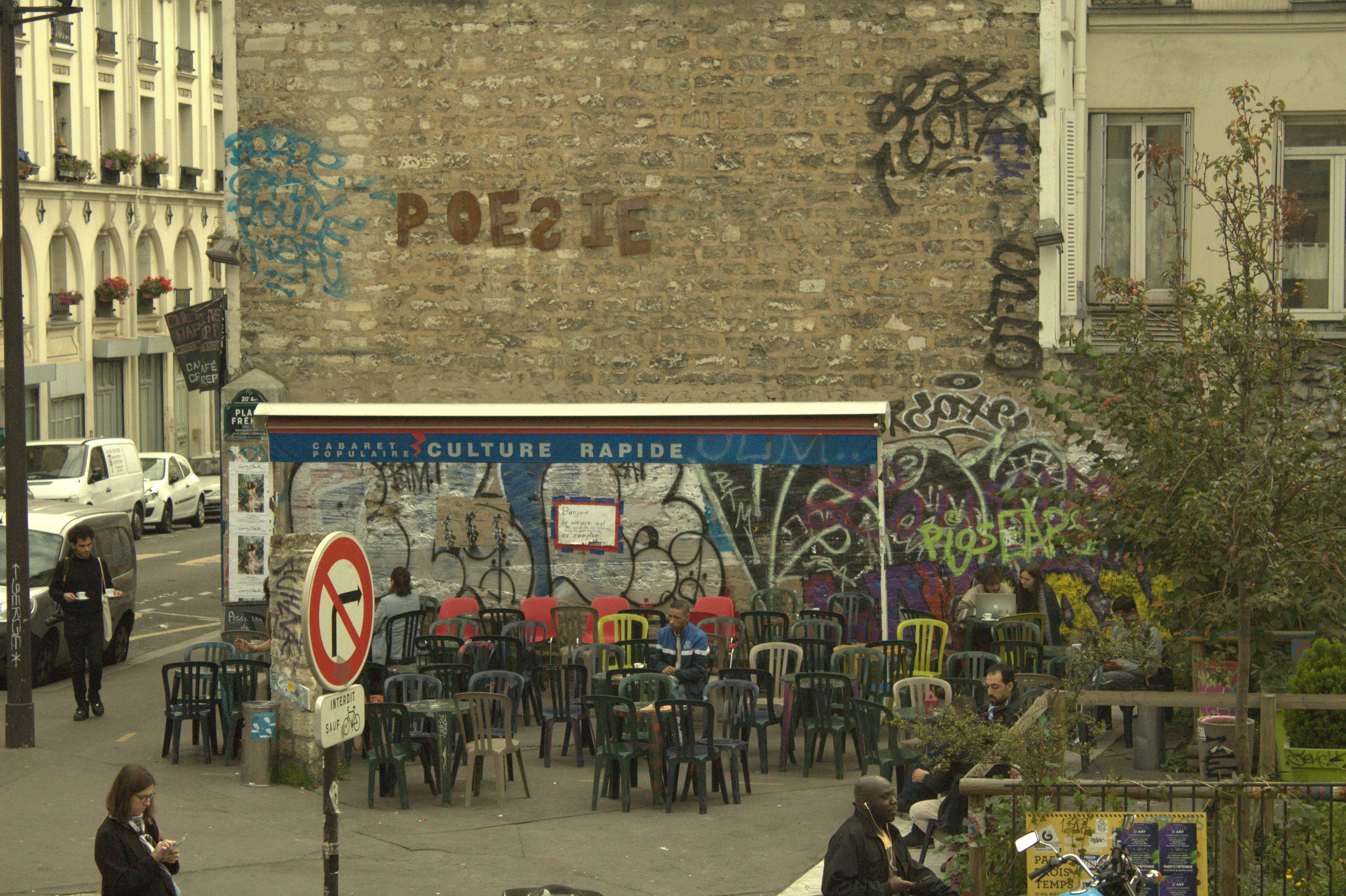 Place Fréhel, quartier de Belleville, Paris